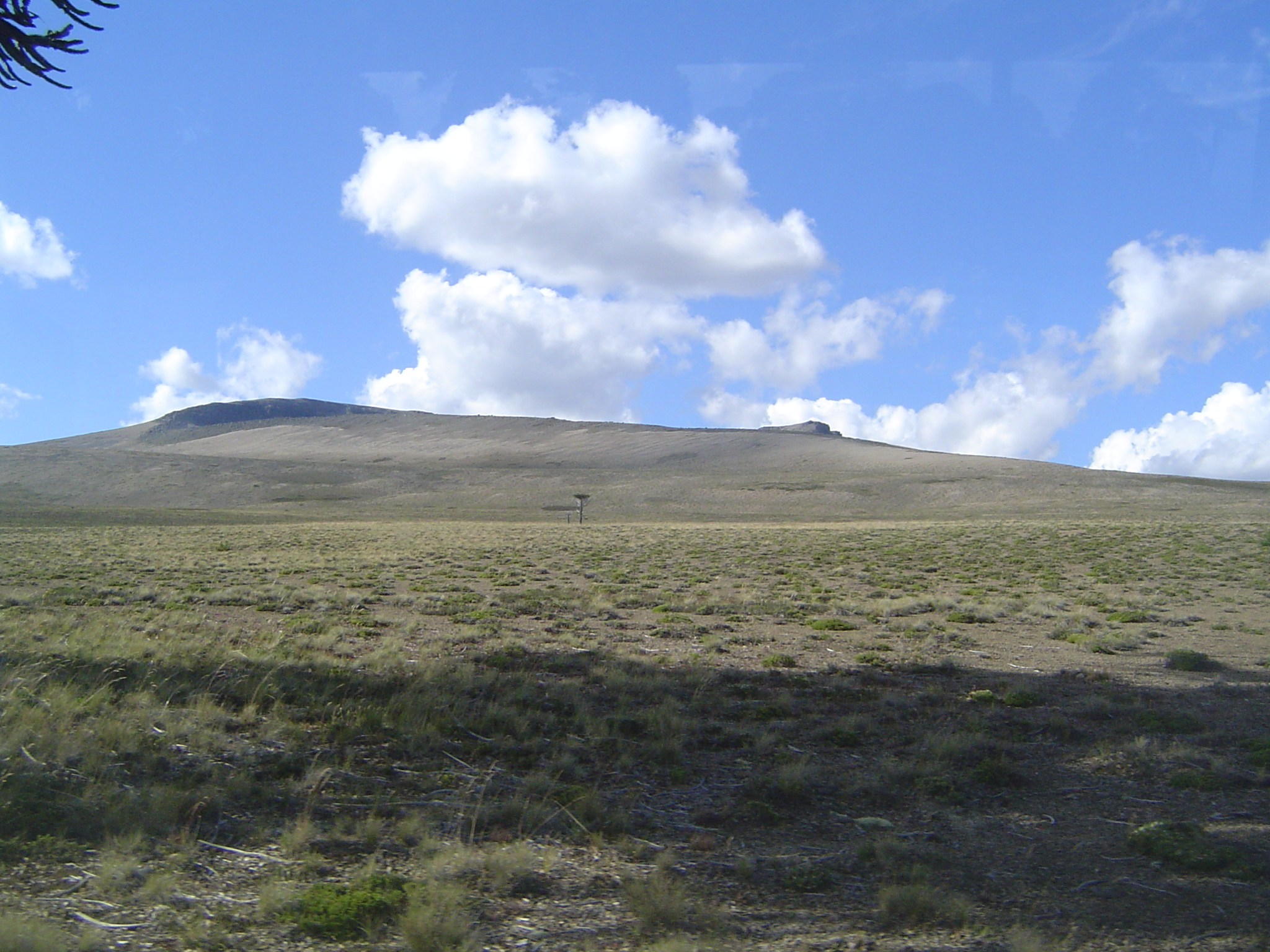 Volcán Batea Mahuida. Vista general.